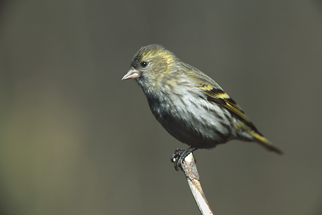 Carduelis spinus